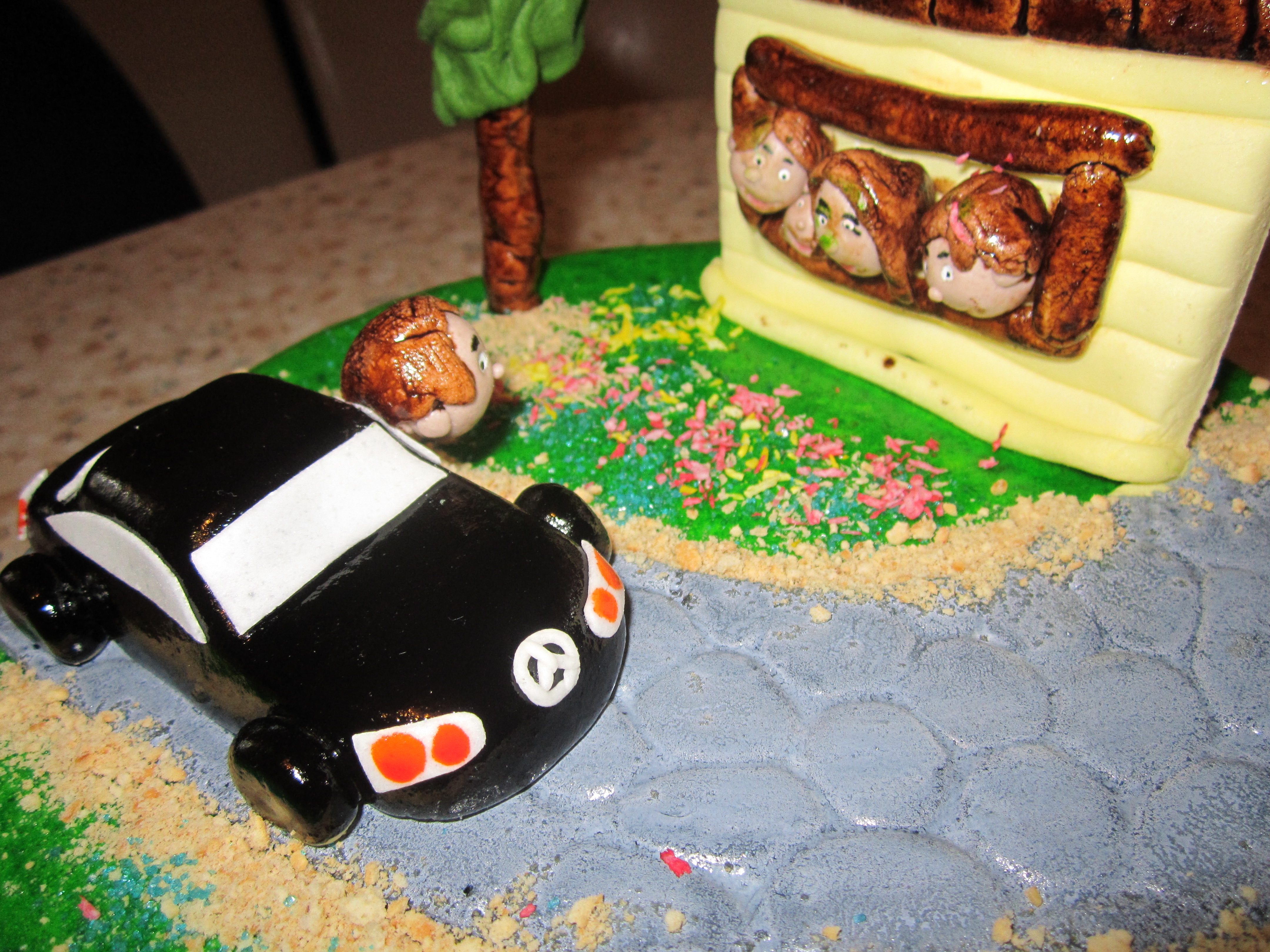 Торт ко Дню рождения с Мерседесом (из зефира)